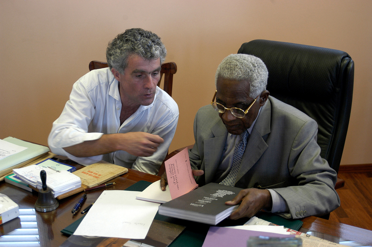 Philippe Mouillon en compagnie d'Aimé Césaire, en 2003